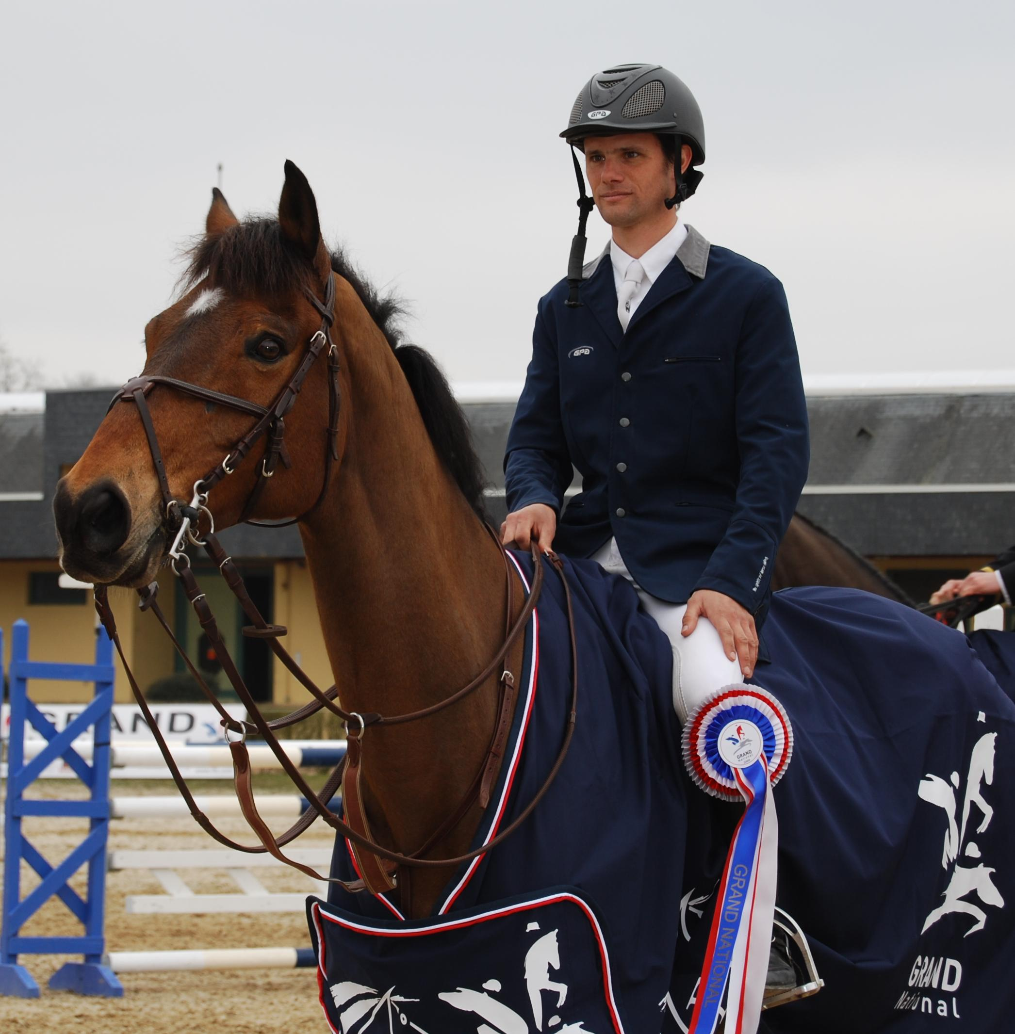 Nicolas Touzaint lors de la remise des prix du Grand National de Saumur, 1er prix.